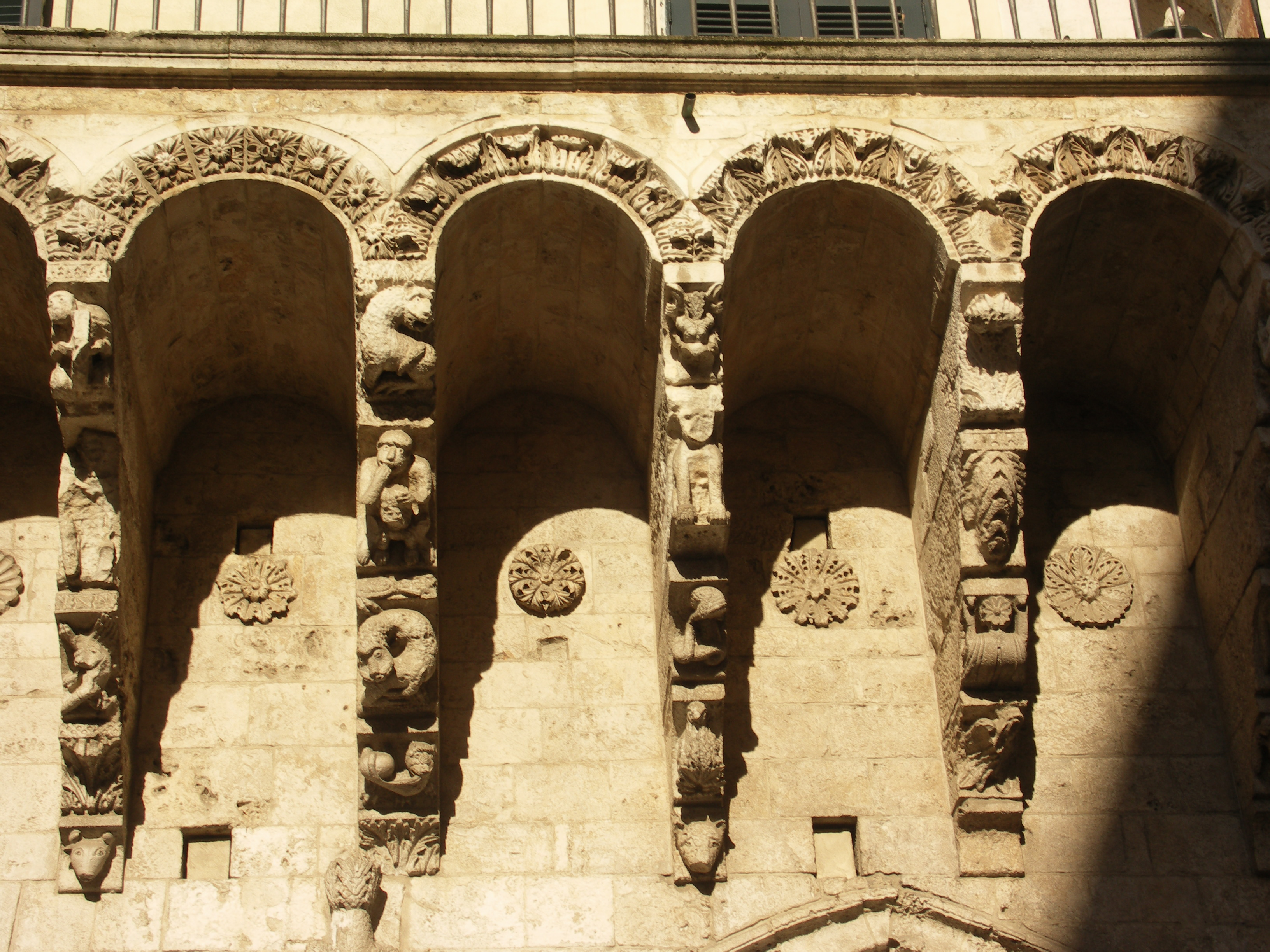 La cosiddetta Loggia Balsamo, balcone medievale con mensole scolpite